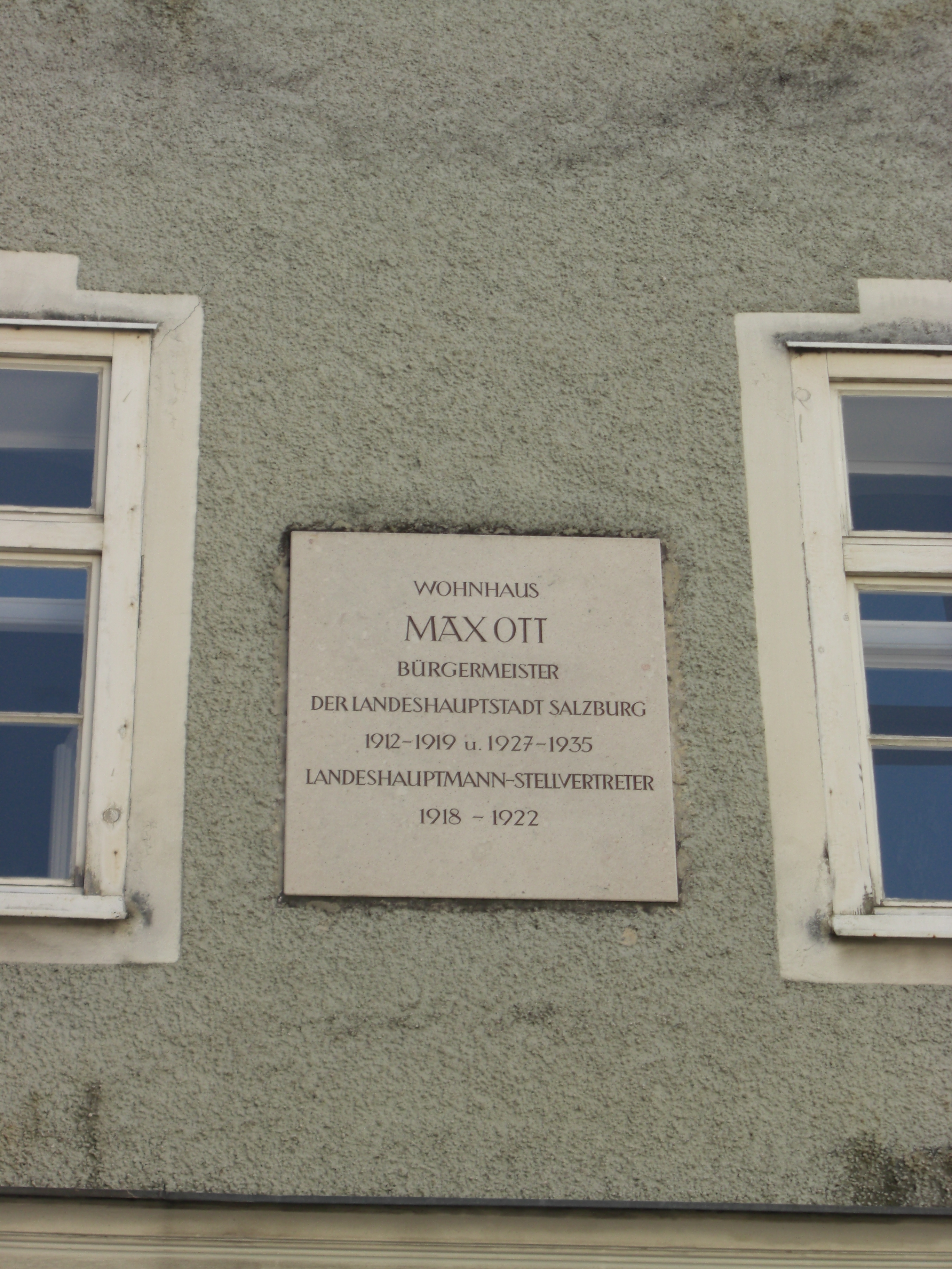 Gedenktafel für Max Ott (1855-1941), österreichischer Politiker, Salzburg, Chiemseegasse 5